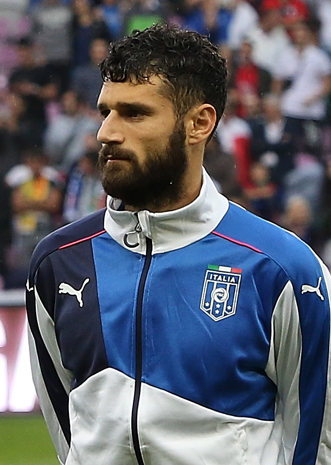 20150616 - Portugal - Italie - Genève - Antonio Candreva